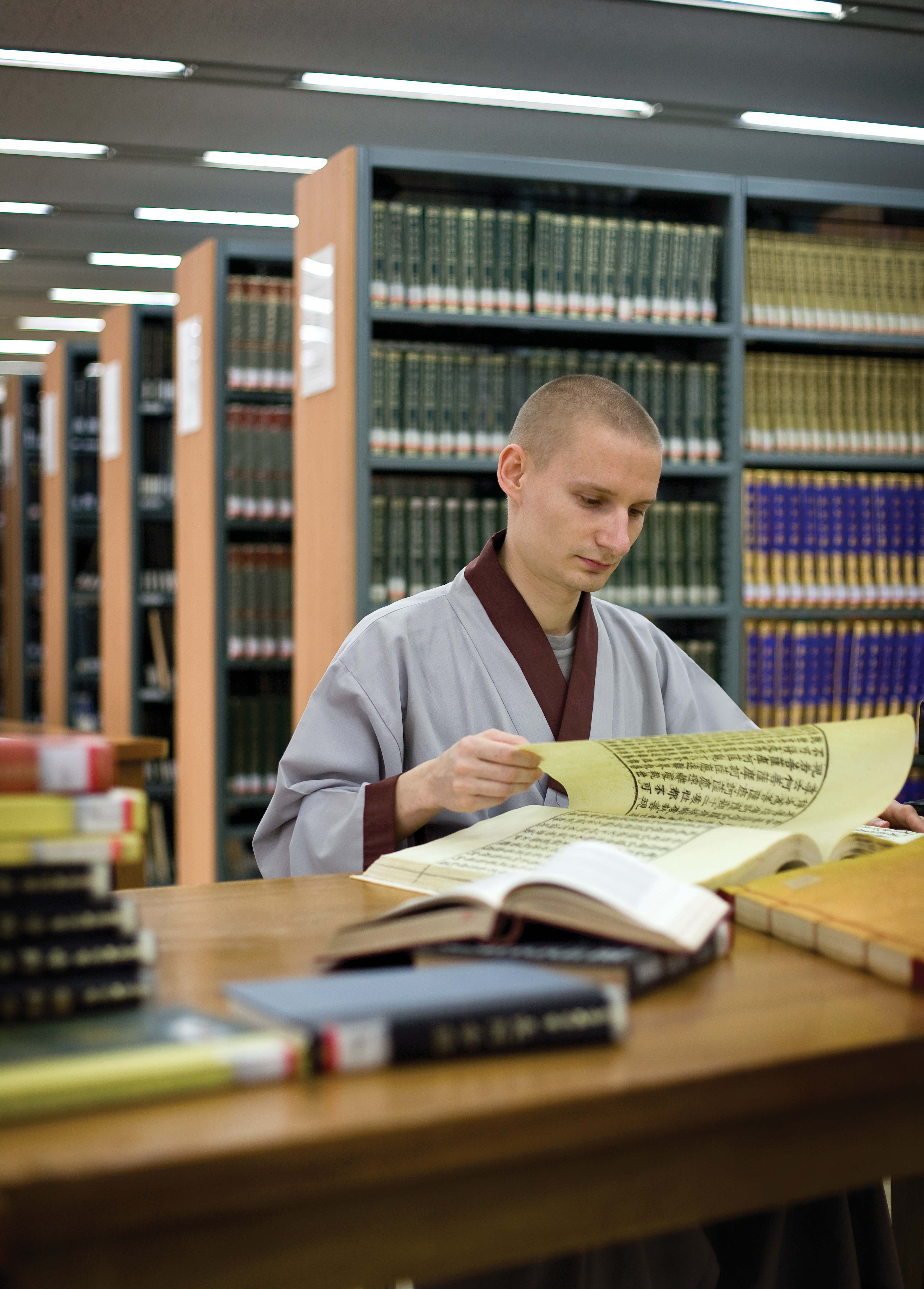 DONGGUK UNIVERSITY